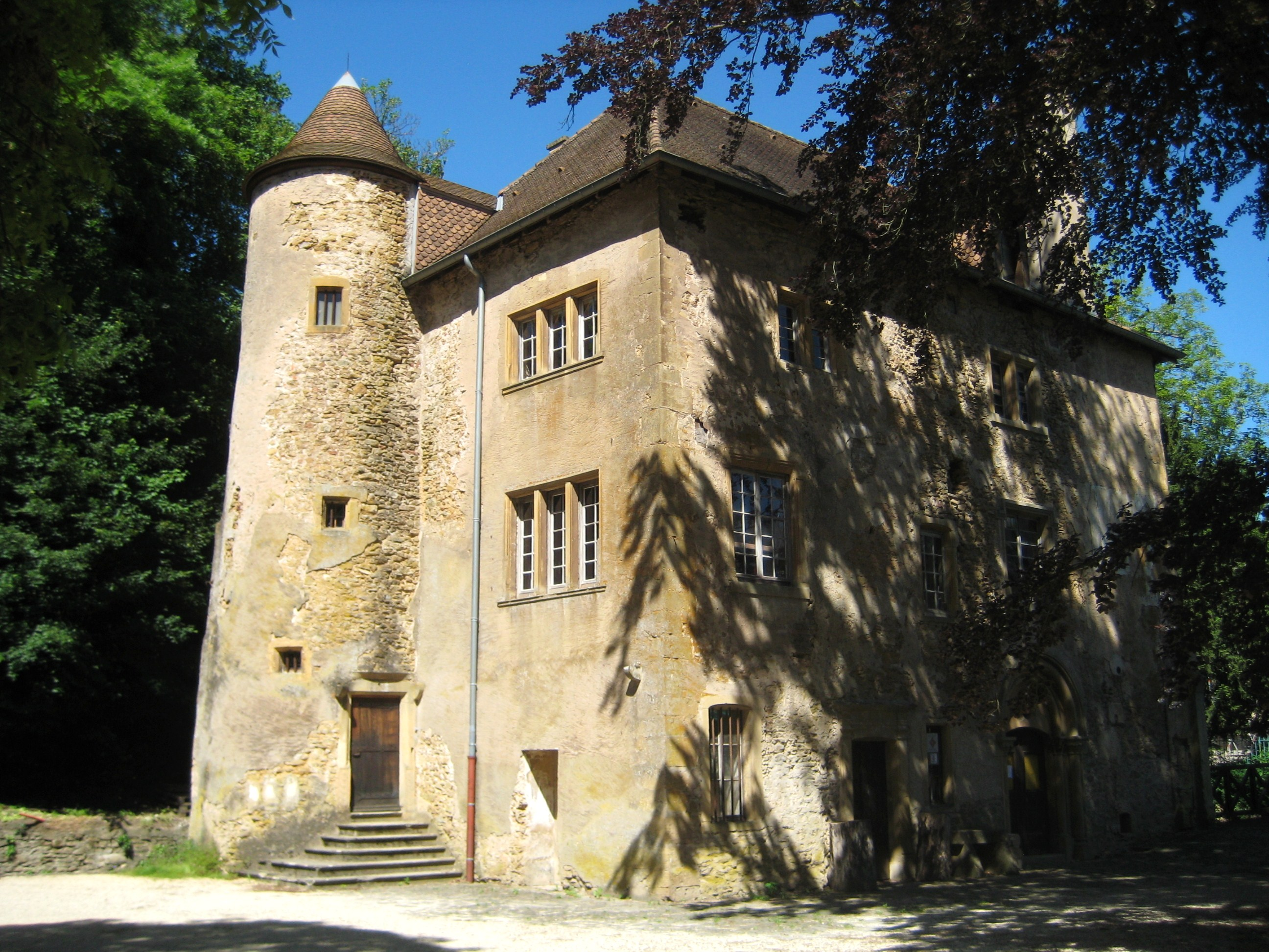 Description Château de Volkrange Date4 June 2009Sourcemon appareil photoAuthorAimelaime Château de Volkrange